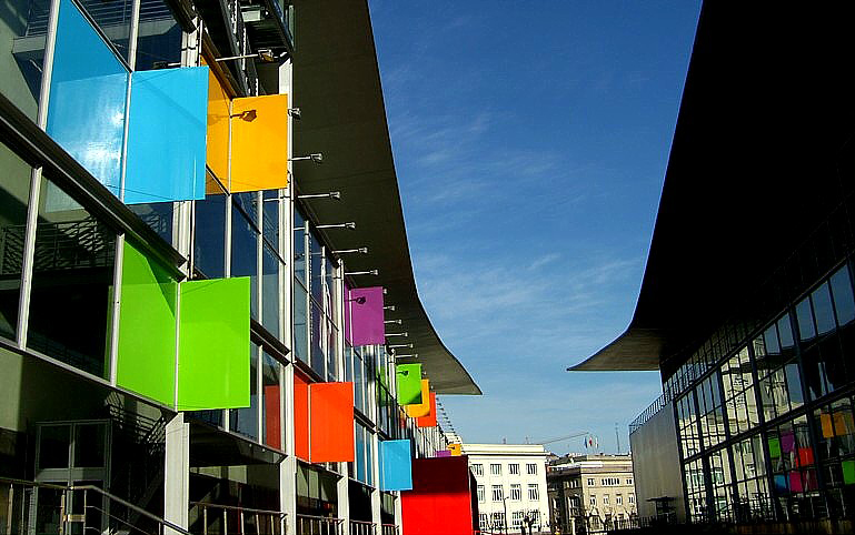 PALEXCO (Palacio se Exposicións da Coruña) e centro comercial, encóntrase dentro do recinto portuario.